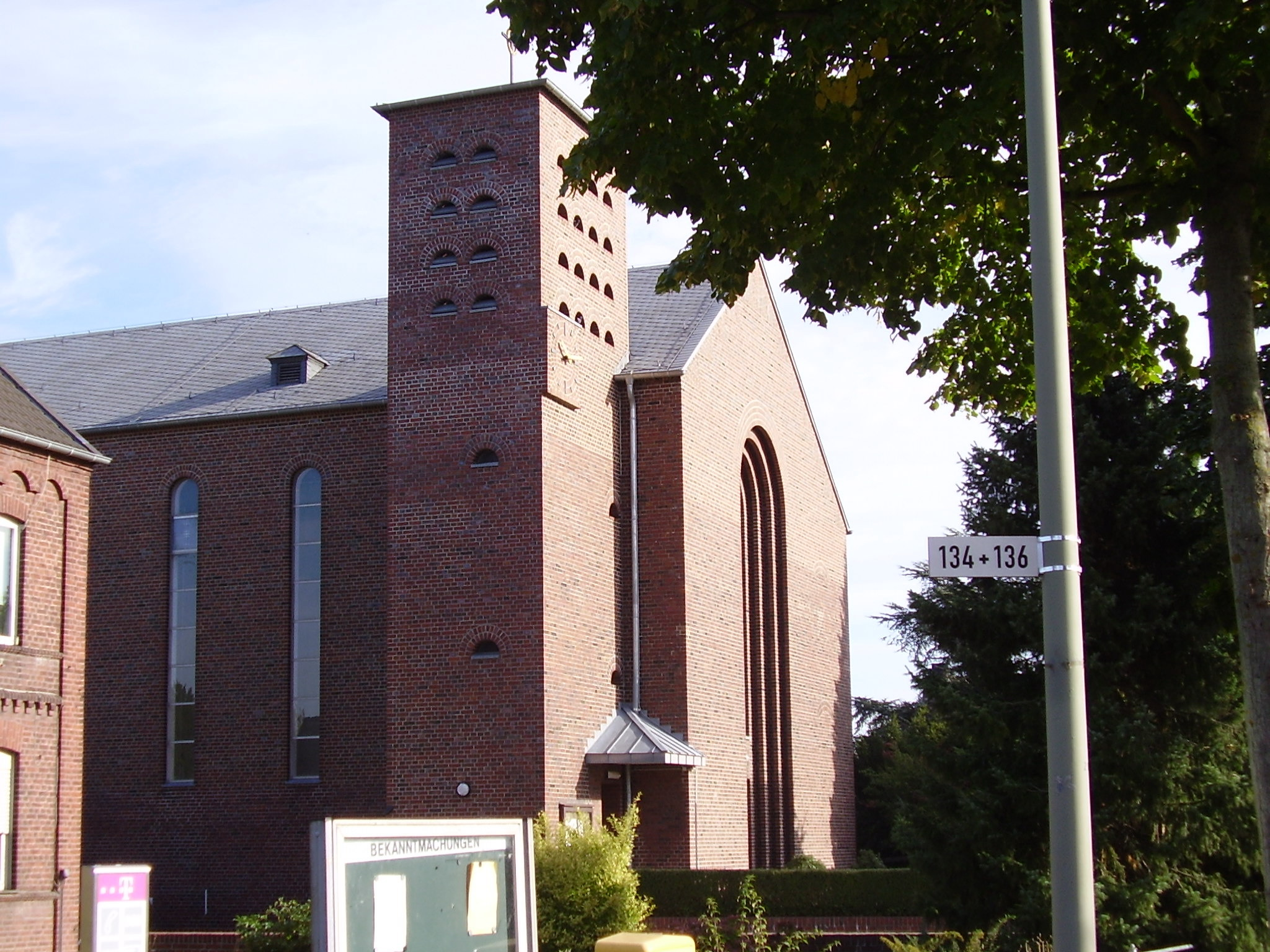 Tüschenbroicher Kirche.